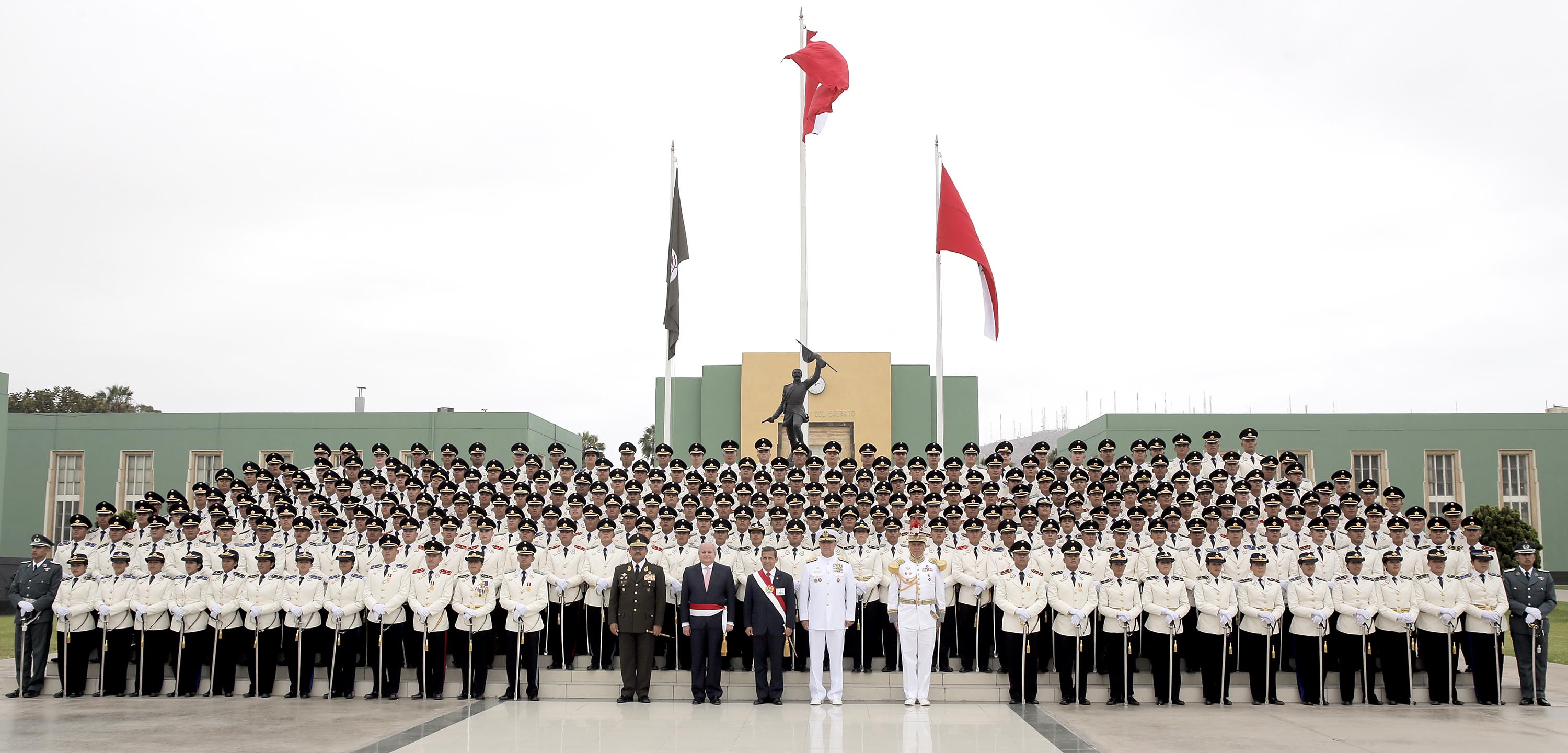 El ministro de Defensa, Pedro Cateriano Bellido, participó en la ceremonia de graduación de 262 nuevos oficiales de la Centésima Vigésima Promoción “Mayor Alfredo Novoa Cava” de la Escuela Militar de Chorrillos. El acto fue presidido por el Jefe de Estado Ollanta Humala Tasso en su calidad de Jefe Supremo de las Fuerzas Armadas, quien entregó los respectivos sables a los integrantes de la promoción, 238 varones y 24 damas. La Espada de Honor recayó en la oficial Vanessa Torres Sullca, de la especialidad de Inteligencia.